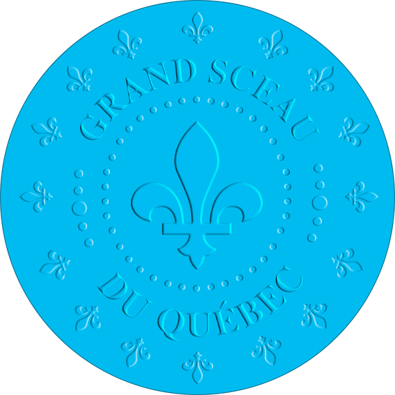 Grand Sceau du Québec